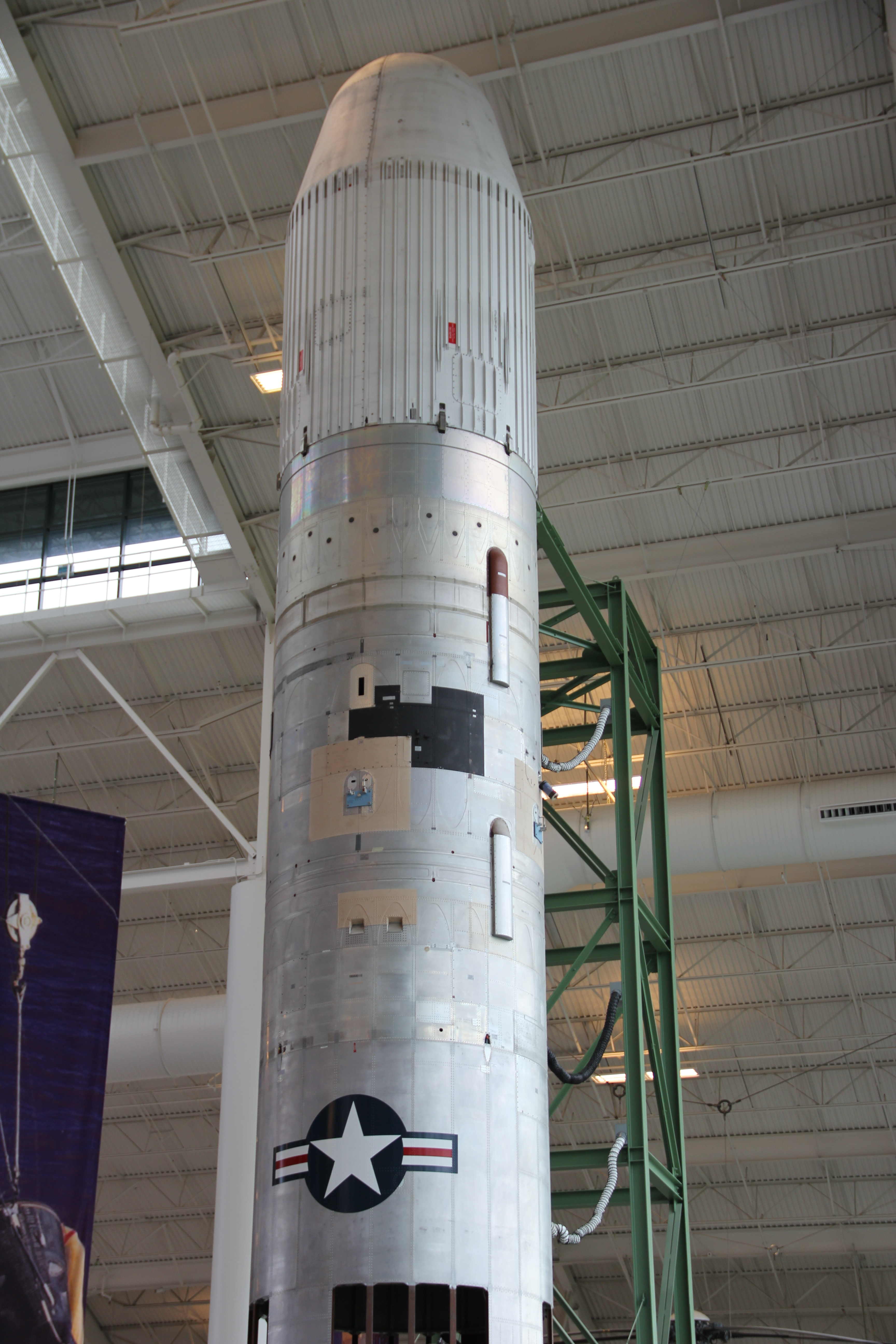 LGM-25C Titan II